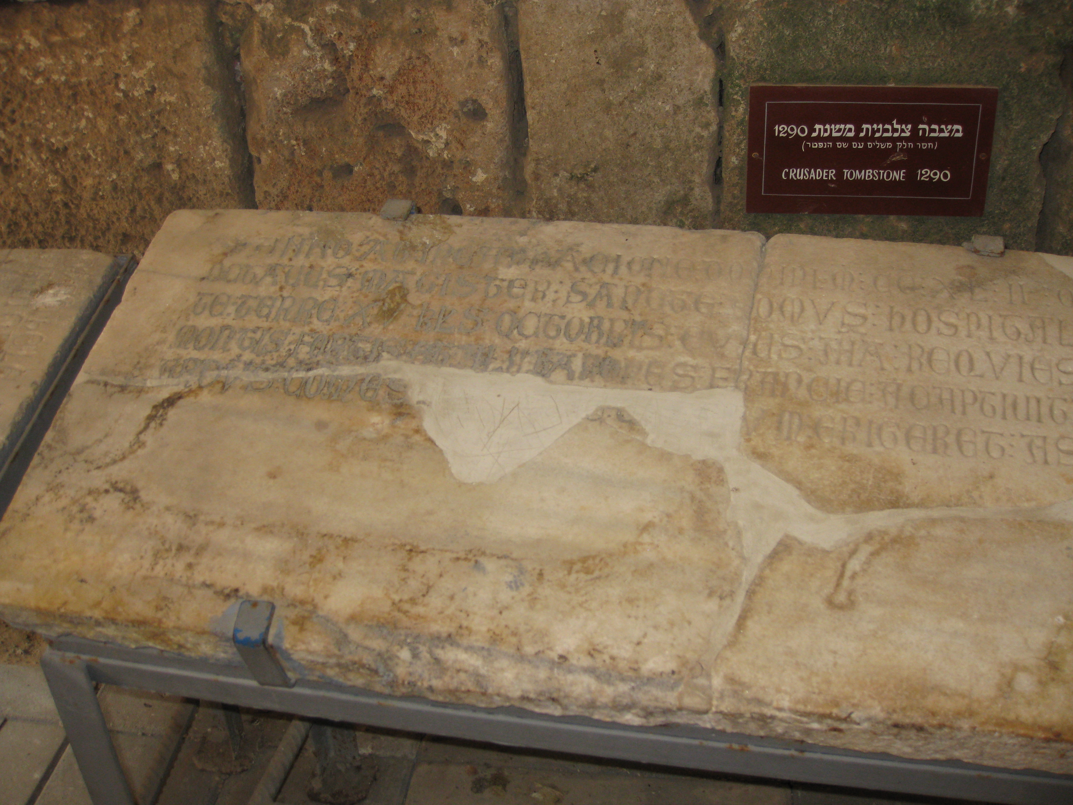 Crusader's Halls אולמות האבירים